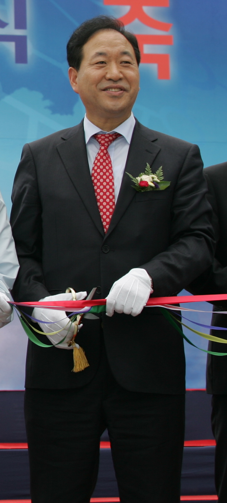 경기도와 평택시는 15일 지역 경제 발전에 대한 Lg전자의 공로를 인정해 이날 완공한 평택시 진위면 소재 Lg전자 평택 디지털파크 인근 산업 도로를 ‘Lg로’로 공식 명명했다. 사진은 안민석 오산시 국회의원, 원유철 평택시 국회의원, 강신익 Lg전자 사장, 김문수 경기도지사, 김선기 평택시장(사진 왼쪽부터)이 테이프 커팅하는 장면.